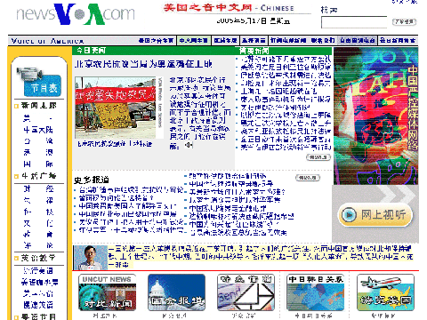 美国之音中文网2005年6月17日截图